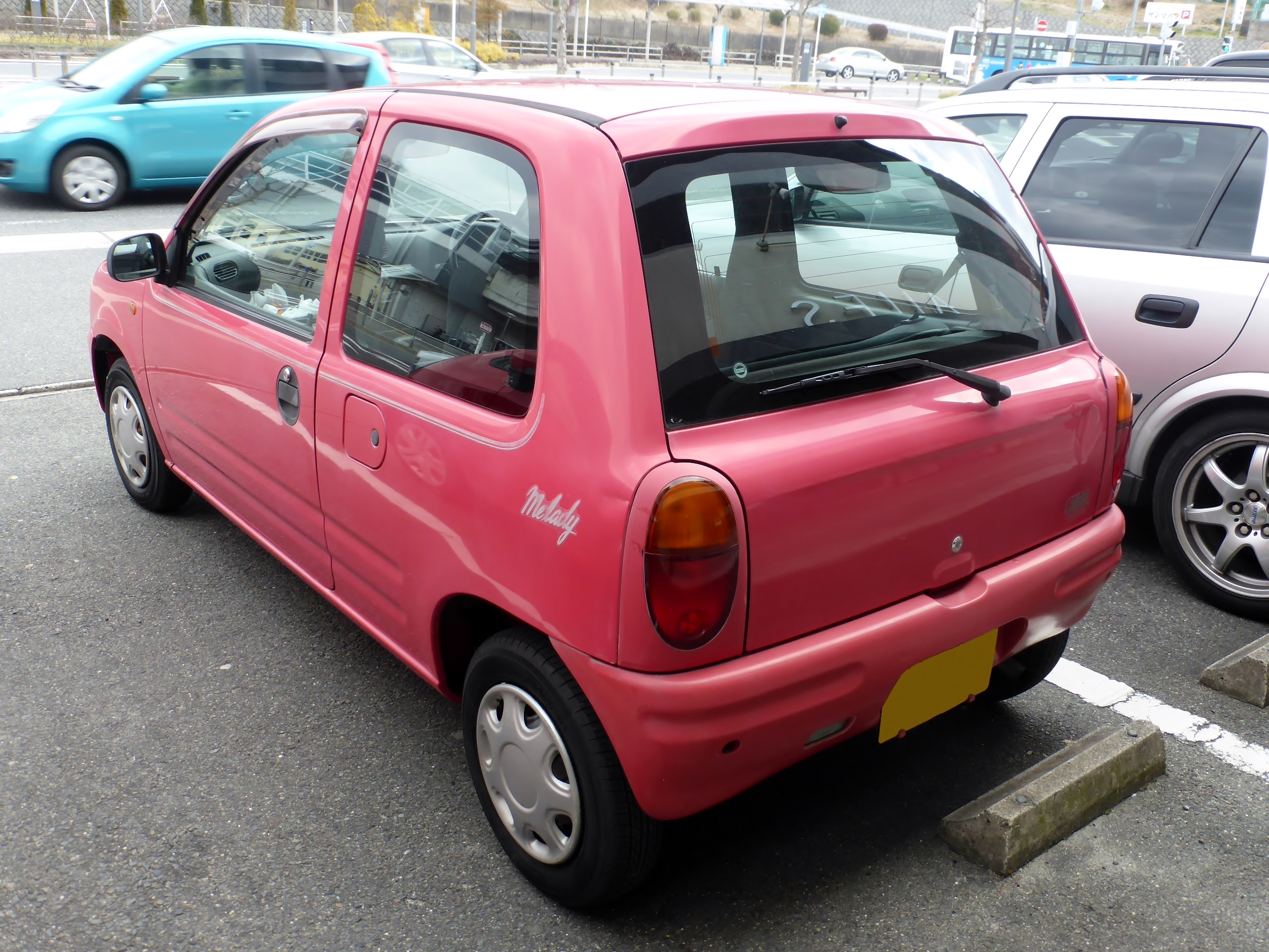 AC6P型オートザム・キャロルをフロントから撮影。